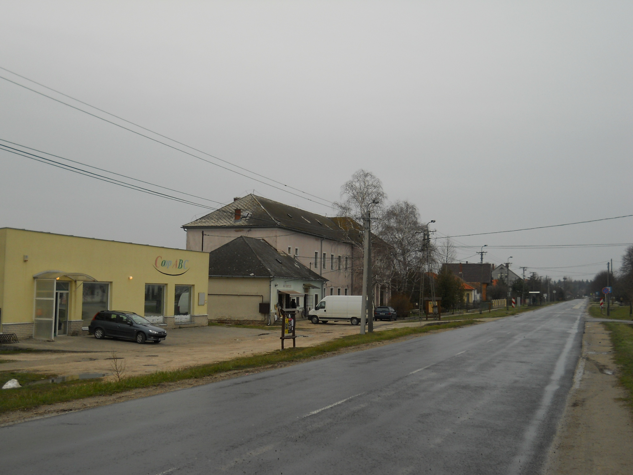 Soponya - Petőfi utca